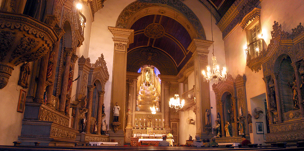 Interior da Igreja de Nossa Senhora da Conceição, Porto Alegre, Brasil.